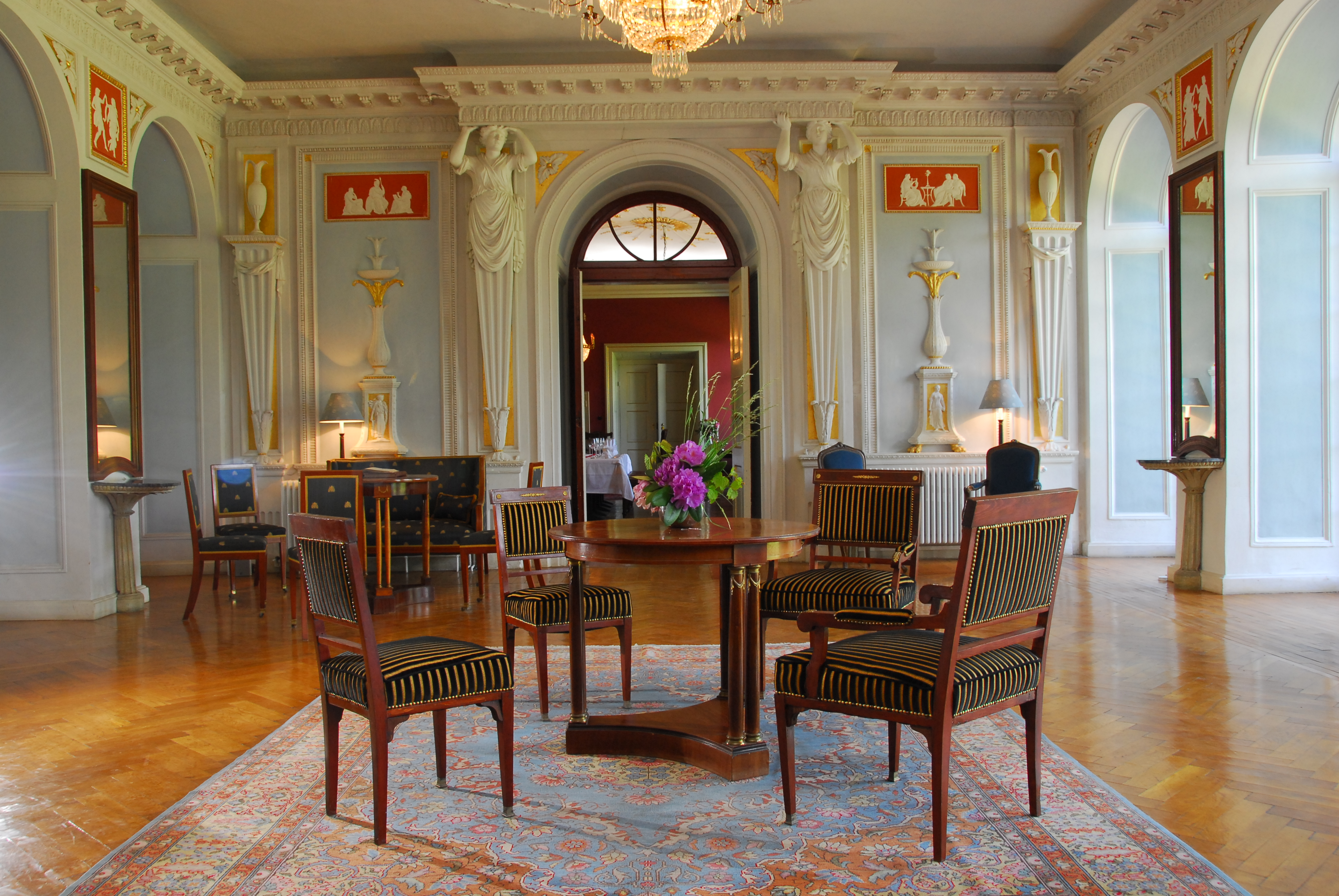 Spiegelsaal Hornjoserbsce: Špihelowa žurla w Hušćanskim hrodźe.